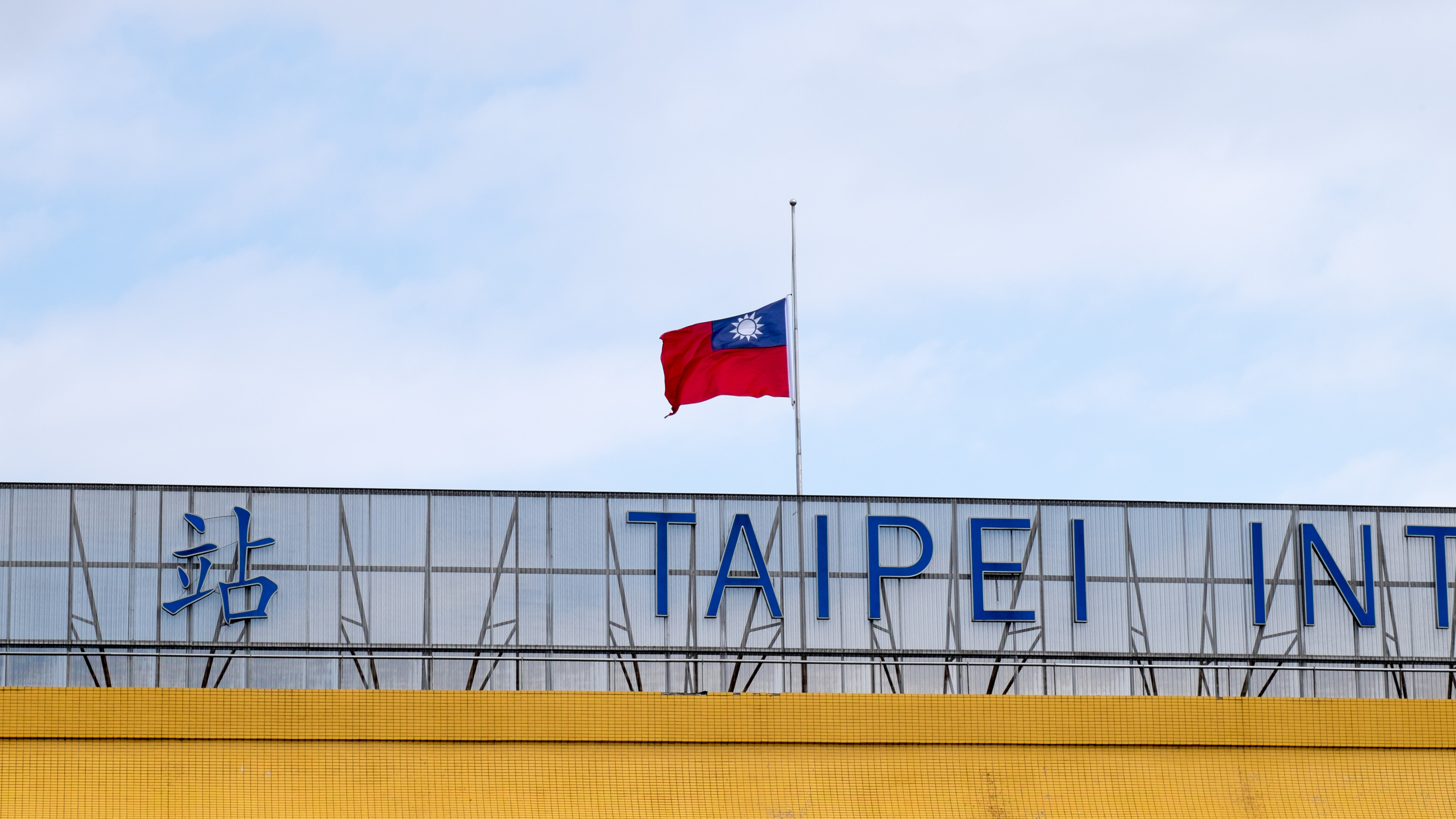 復航GE235班次出發地臺北松山機場第一航站大樓，2015年2月10日空難頭七屋頂下半旗。